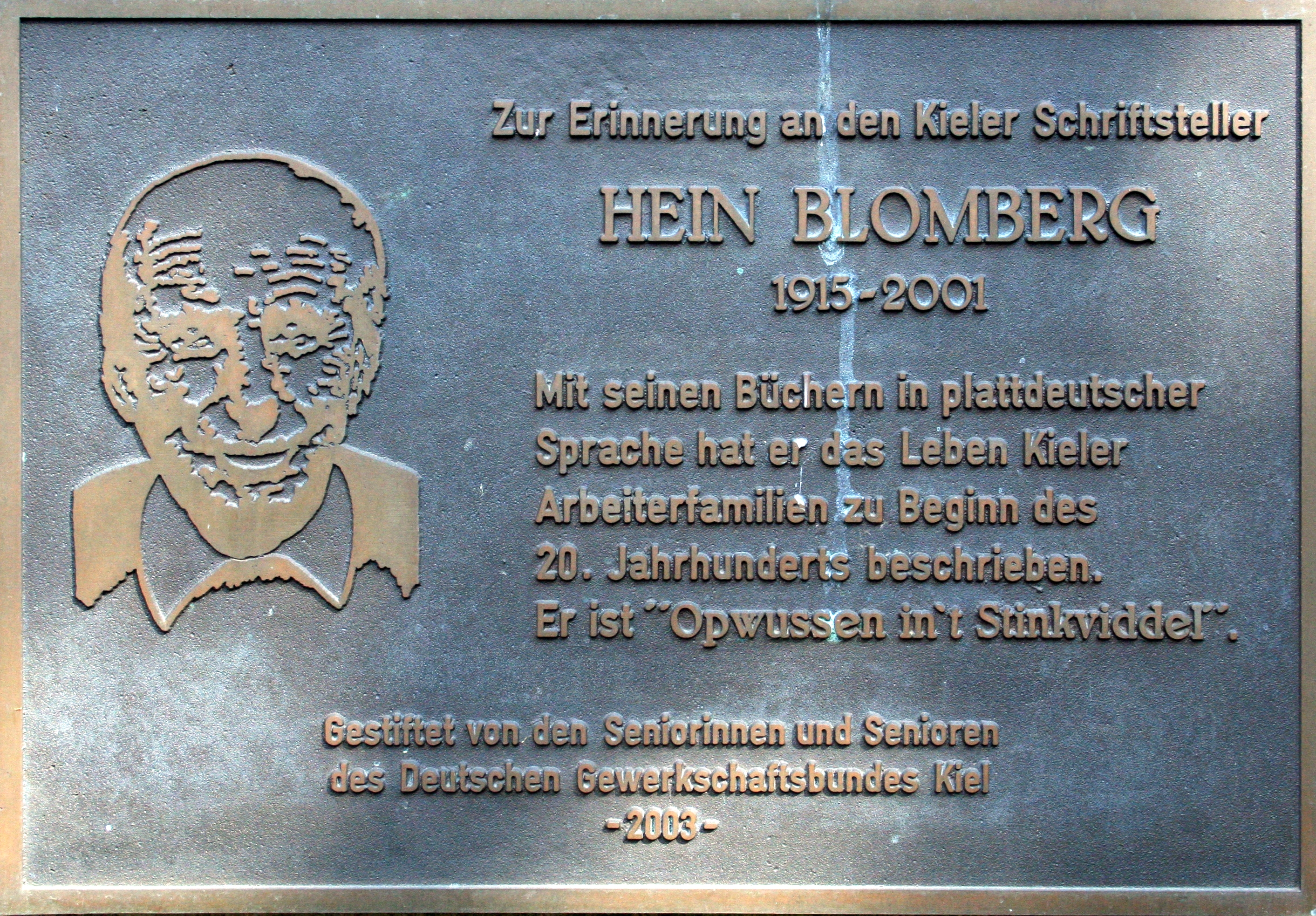 Gedenktafel zu Ehren des Kieler Schriftstellers Hein Blomberg. Die Tafel befindet sich an einem Gedenkstein in der Klotzstraße 8. Die Inschrift der Tafel lautet: Zur Erinnerung an der Kieler Schriftsteller HEIN BLOMBERG 1915–2001 Mit seinen Büchern in plattdeutscher Sprache hat er das Leben Kieler Arbeiterfamilien zu Beginn des 20. Jahrhunderts beschrieben. Er ist „Opwussen in’t Stinkviddel”. Gestiftet von den Seniorinnen und Senioren des Deutschen Gewerkschaftsbundes Kiel – 2003